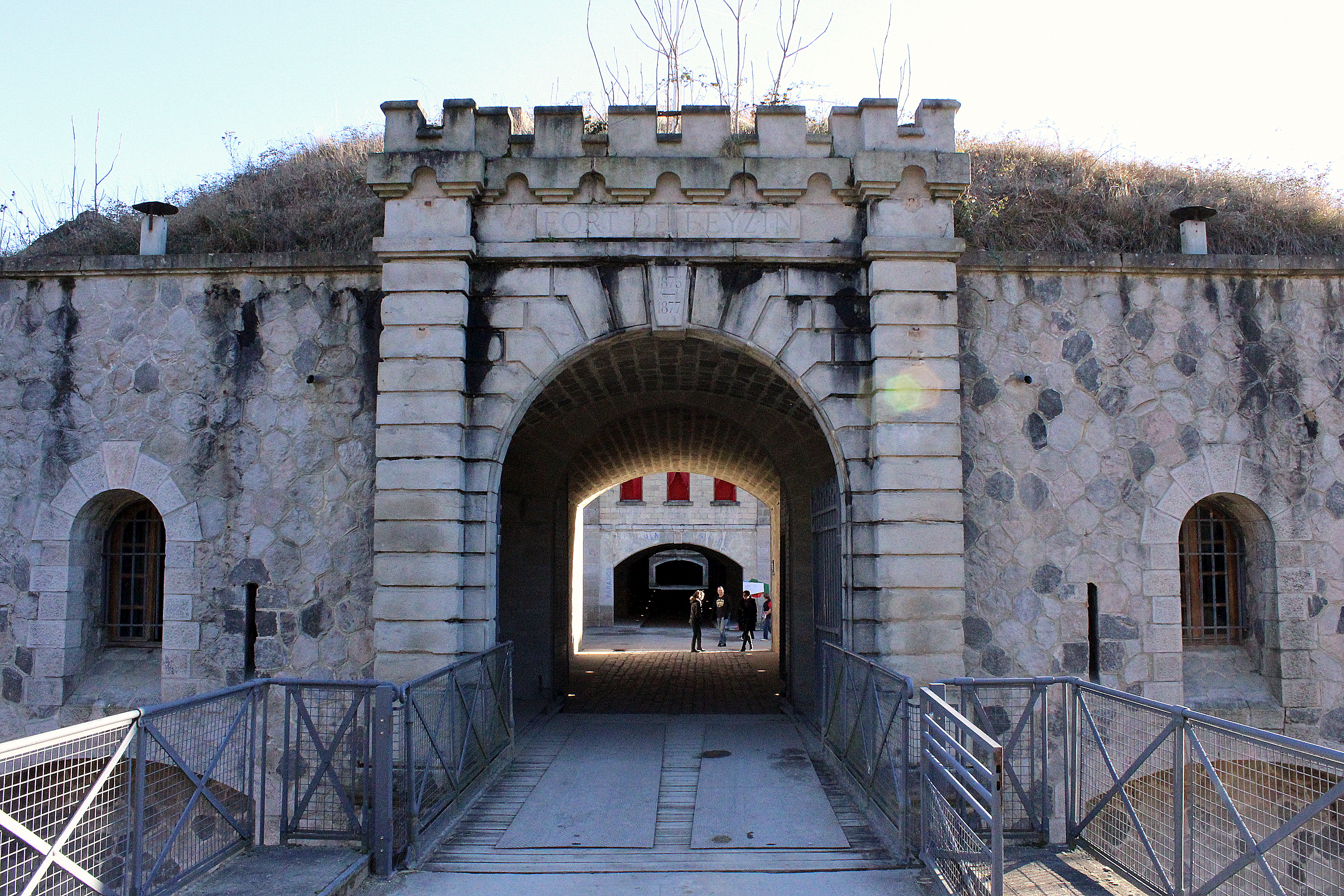 Le fort de Feyzin en 2014.